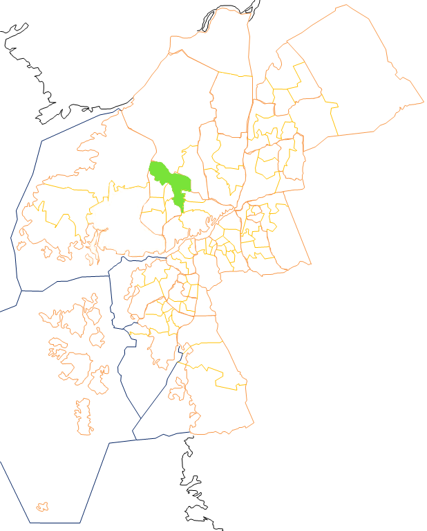 Karta som visar primärområdes belägenhet i Göteborg